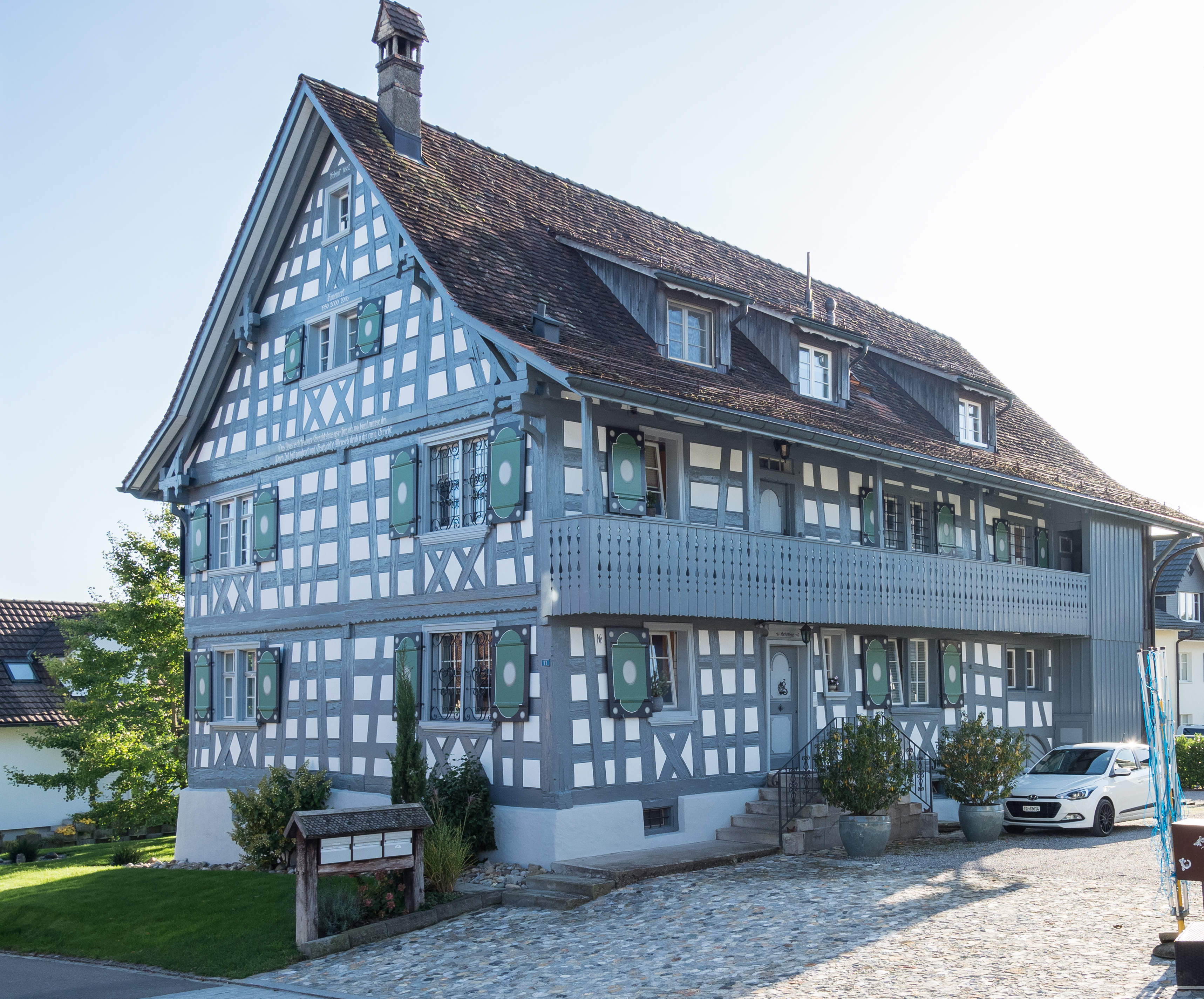 Ehemaliges Gerichtshaus in Zihlschlacht. Erbaut 1662, ausgebaut und erweitert 1740.